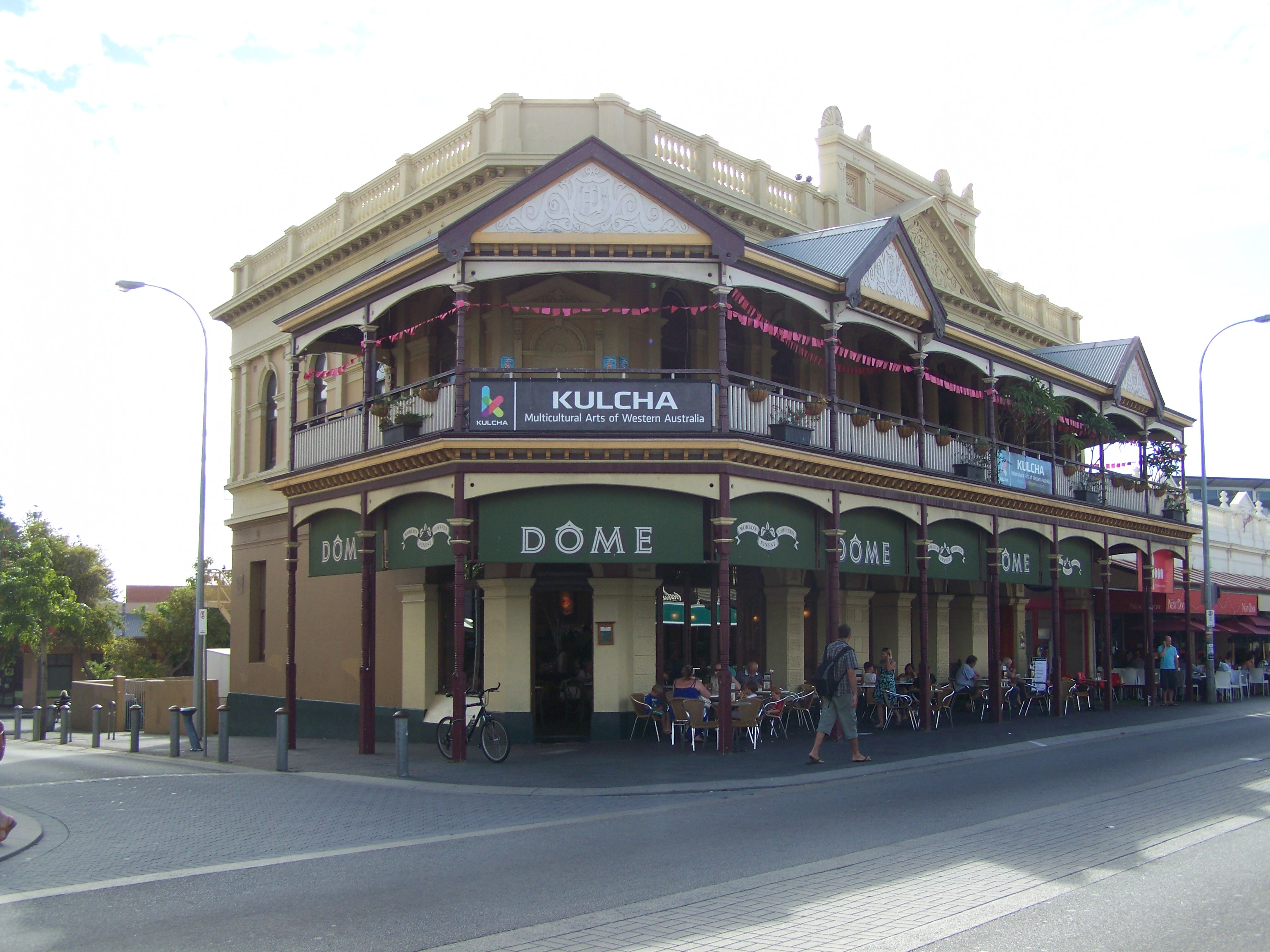 Dome Café